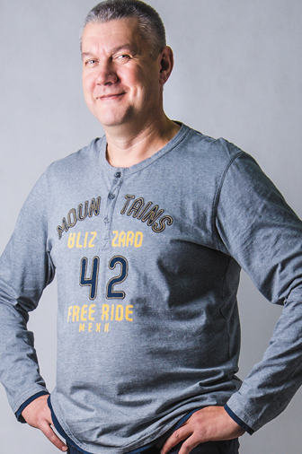 Владимир Карабутов. Заслуженный мастер спорта, заслуженный тренер России, бронзовый призер Олимпийских игр (Барселона, 1992) по водному поло. Многократный чемпион СССР и России. Фотография из серии «Лица эстафеты».